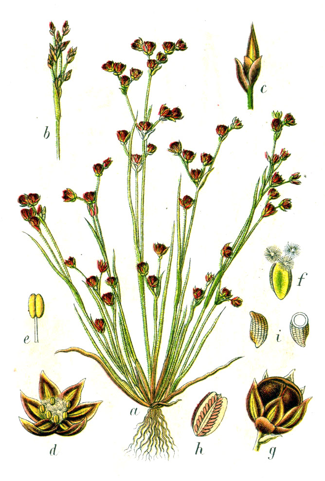 Juncus tenageia Ehrh. ex L.f. Original Caption Zierliches Schweinegras, Juncus tenageia